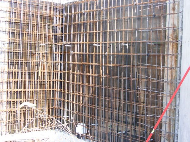 תהליך שיטת ברנוביץ